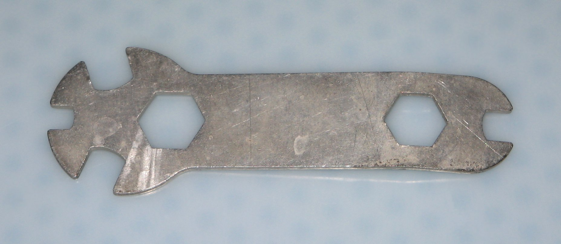 Speciala rencxilo. Tiaspecaj rencxiloj ofte estas donataj en garnituro kun diversaj aparatoj. La foto estis farita de mi mem.